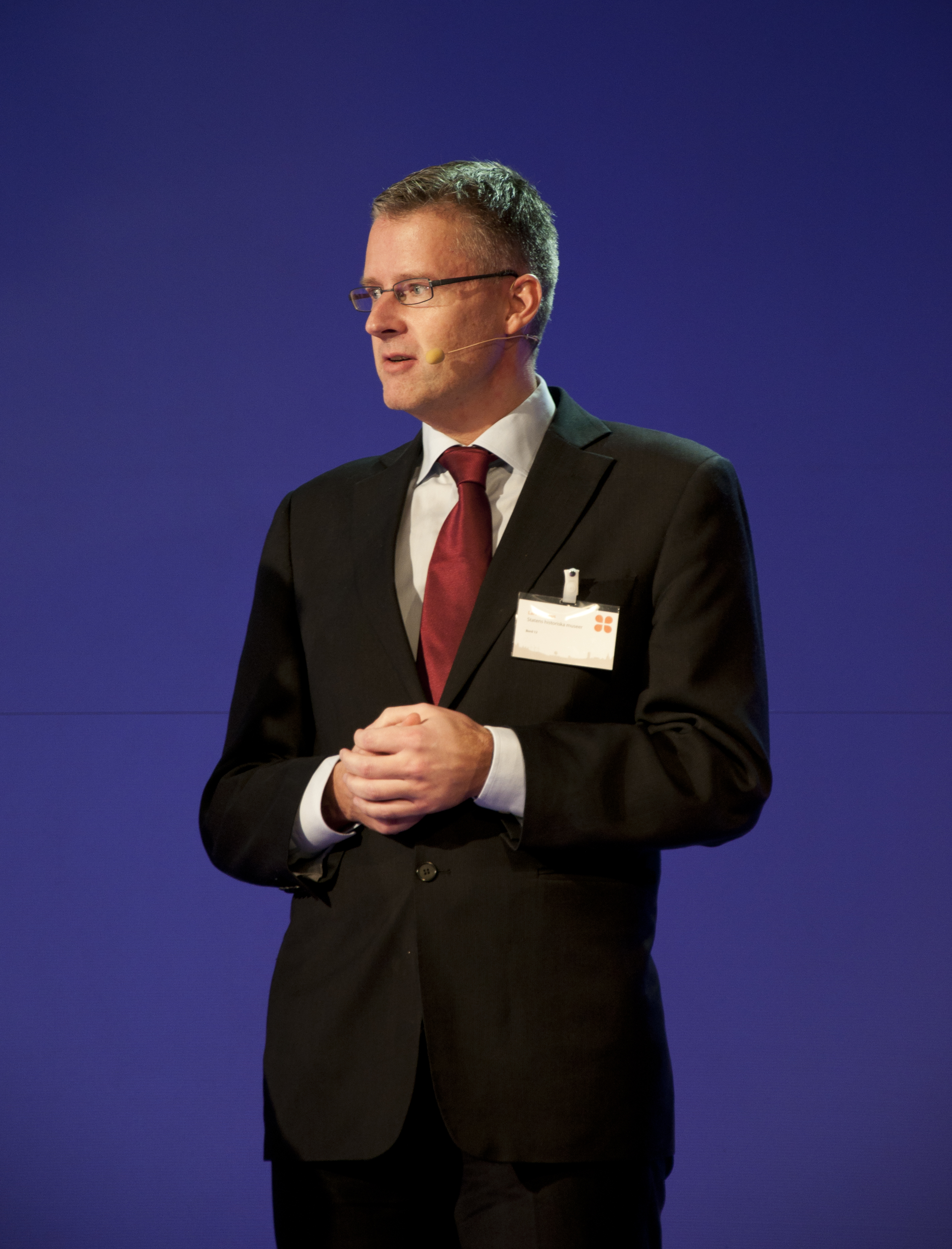 Lars Amréus på Riksantikvarieämbetets Höstmöte i Gustavsberg 2011.